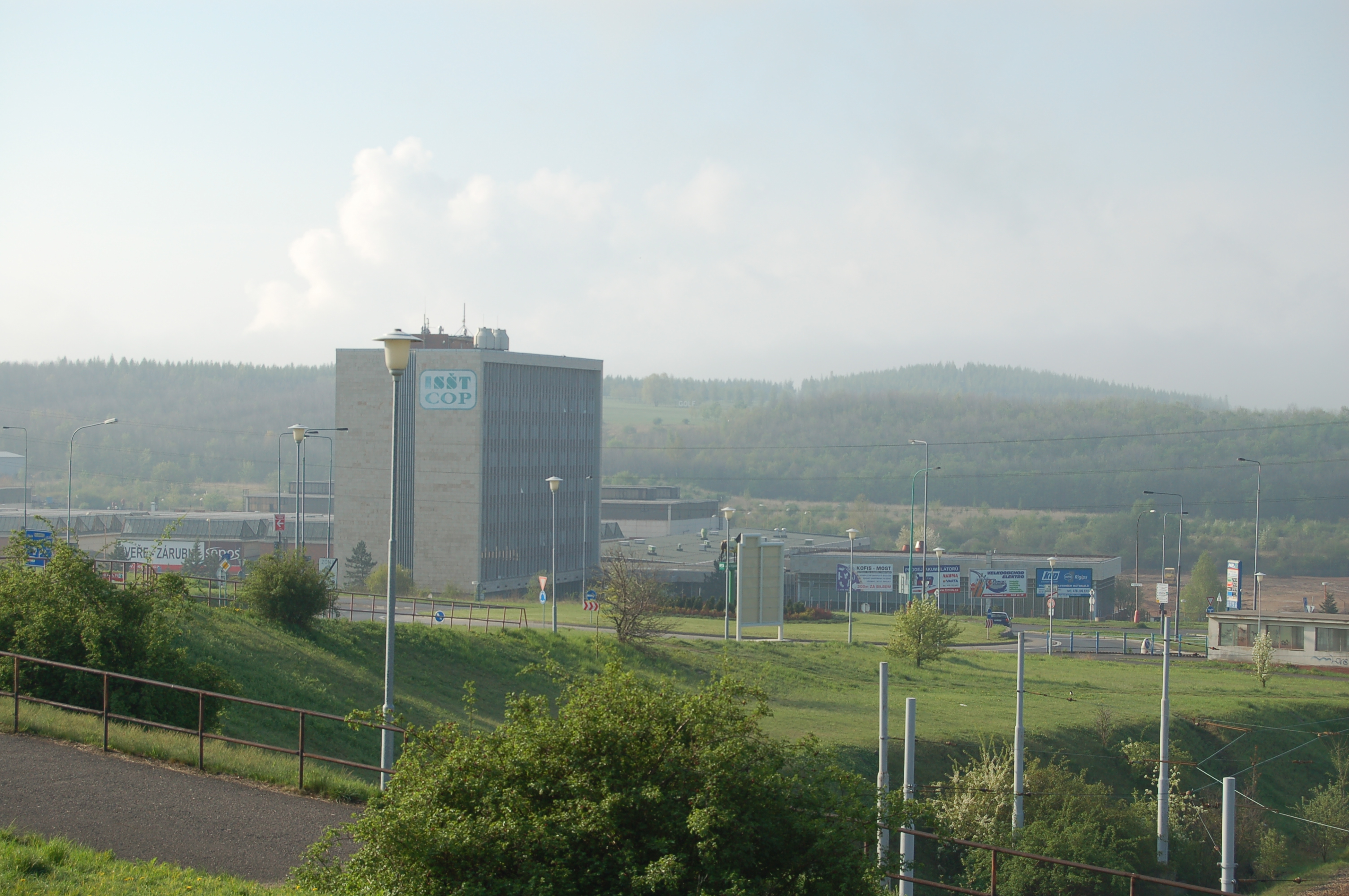 Blick auf Industriegebiet Velebudice in Most mit dem Gebäude der Technischen Mittelschule